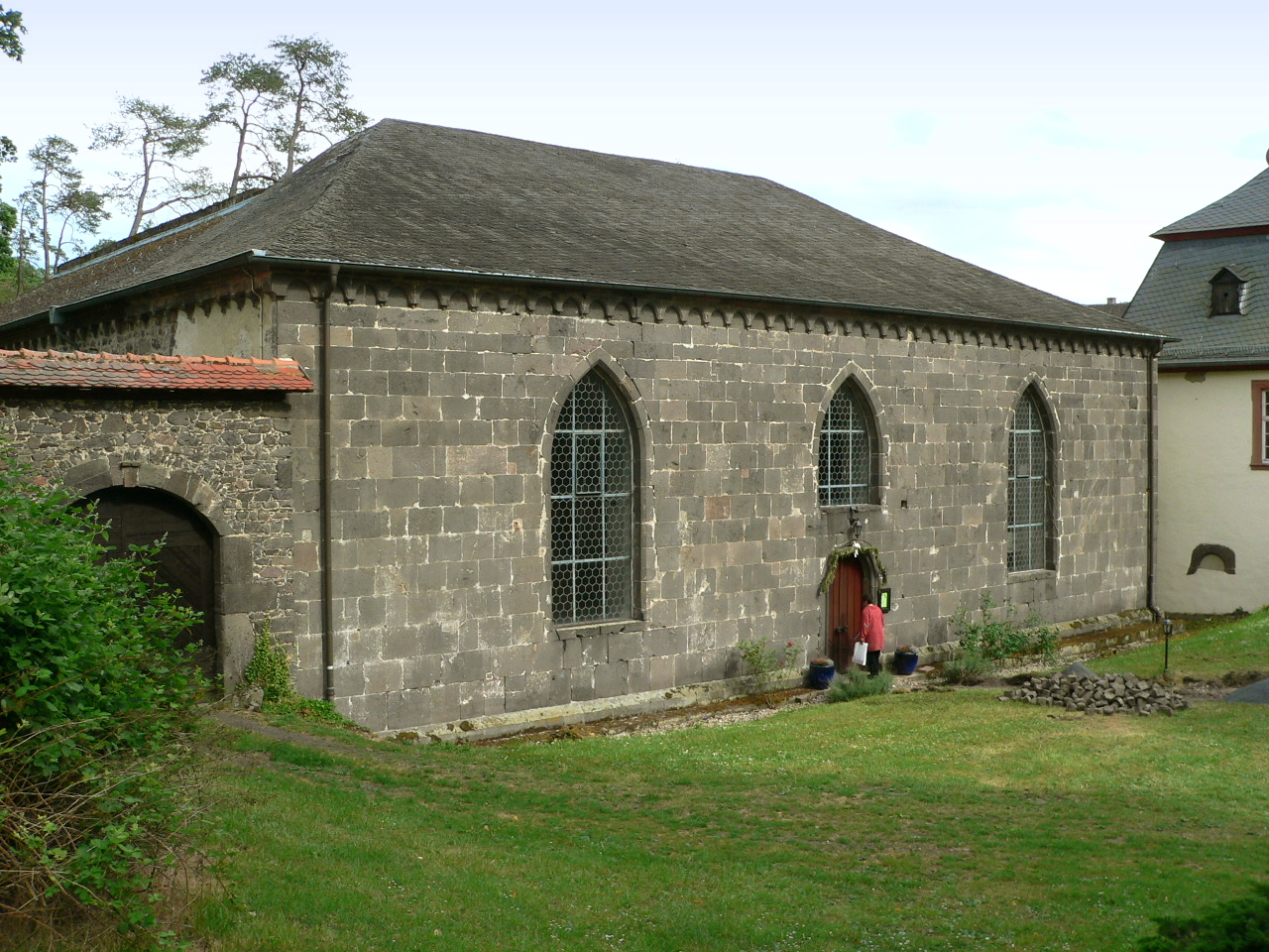 Paradies (Vorkirche) Kloster Arnsburg bei Lich, Hessen, Germany